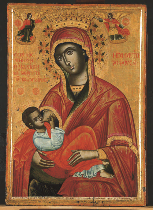 Икона на Света Богородица Млекопитателница от Макарий Галатищки.